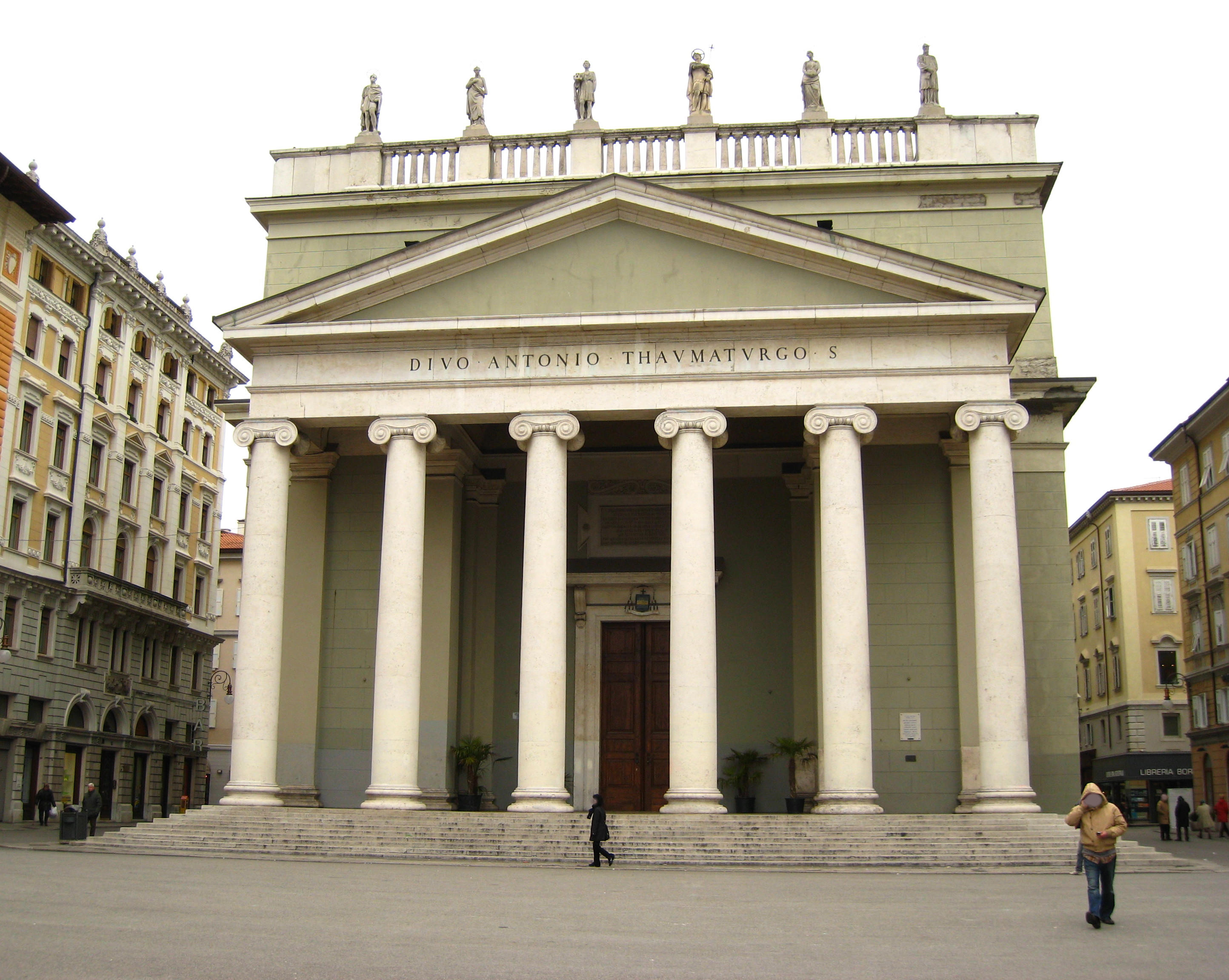 Chiesa di Sant'Antonio nuovo - Trieste.Marzo 2008